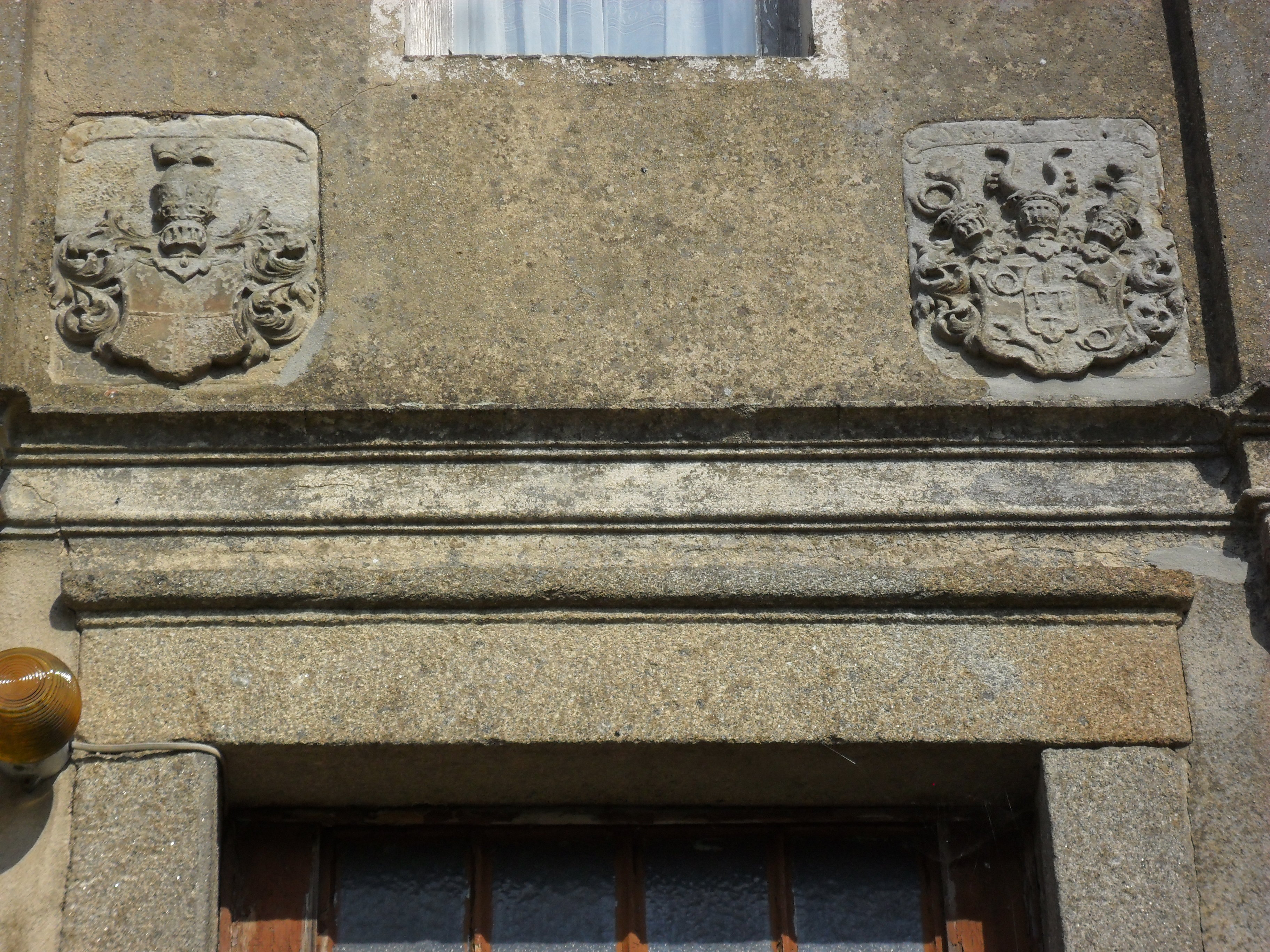 Die beiden sandsteinernen Wappen am Herrenhaus in Jauernick.